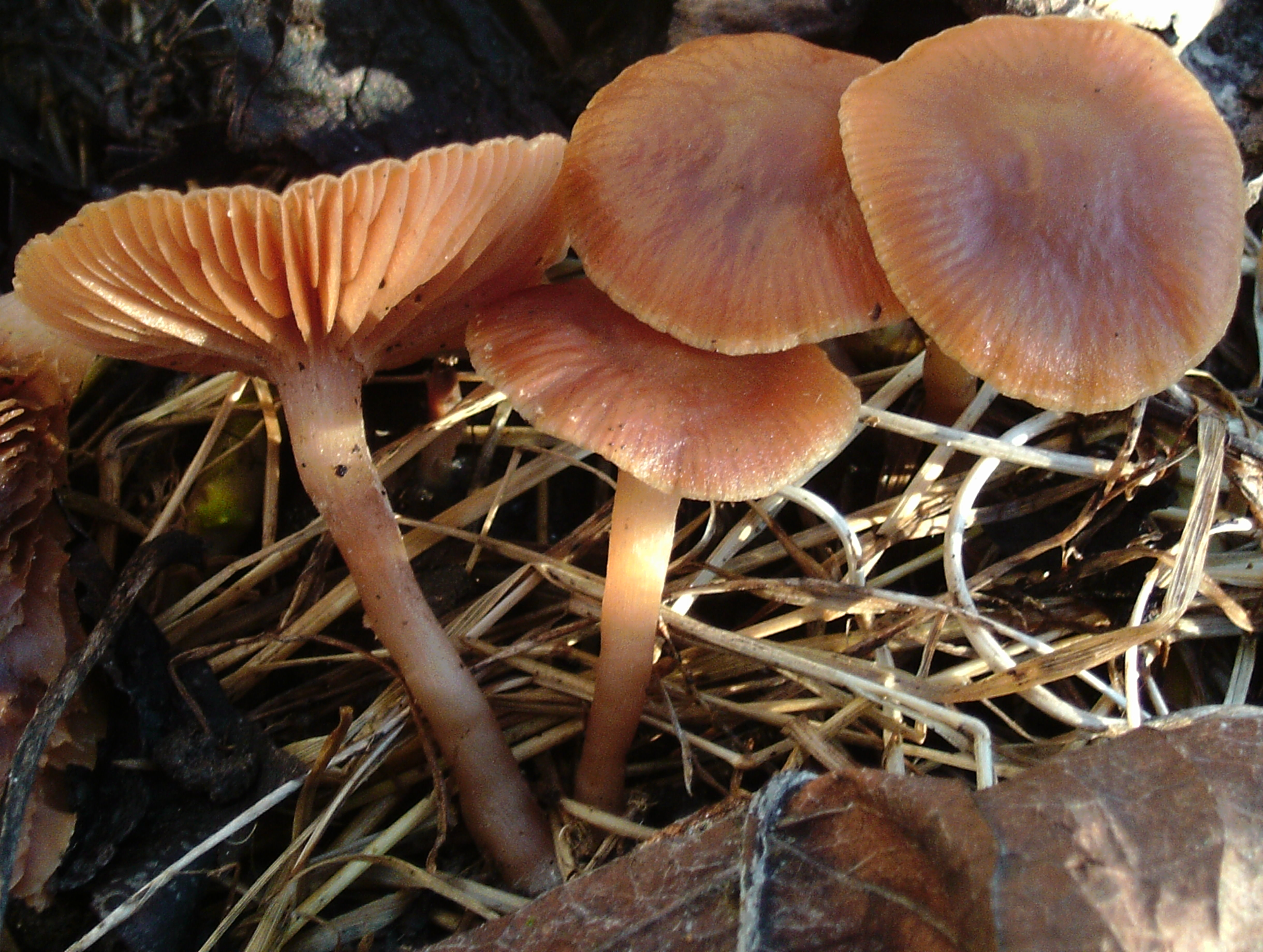 Cortinaire gentil, photo du 20 01 17, lieu 59210, (Les 3 jours qui ont précédé cette photo la température au sol est passé toutes les nuits sous 0°c, (entre environs -1 et -6 je pense) si elle a pu être positive en journée, ça a du être peut de temps) ,disons que le froid ne lui fait pas peur .